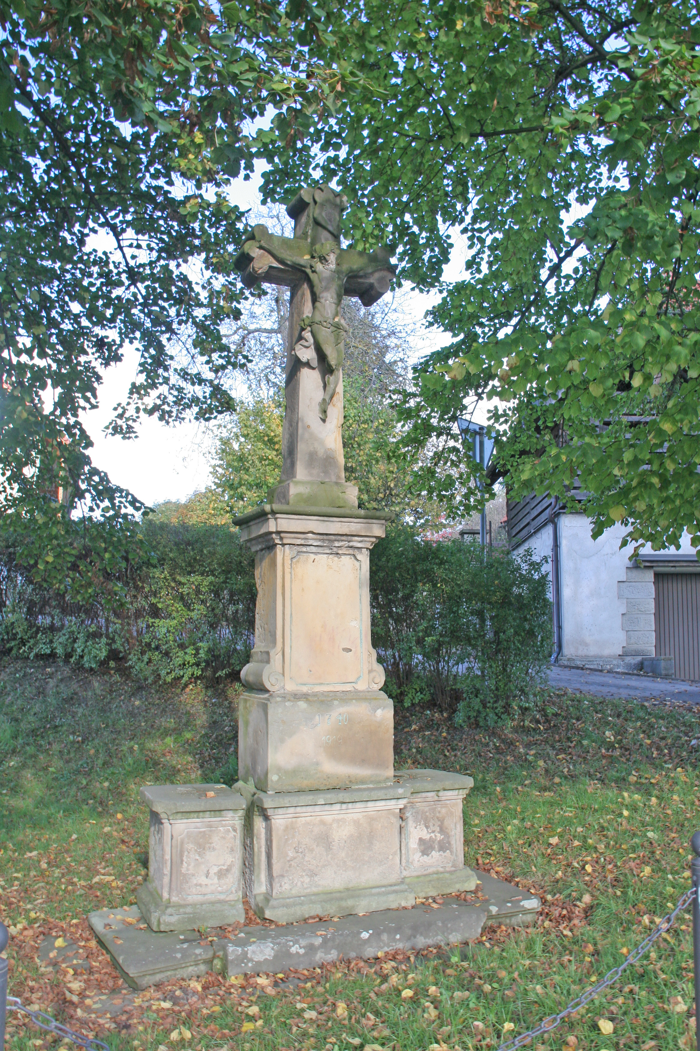 Sousoší Kalvárie, u silnice, poblíž kaple, Bukvice (okres Jičín).